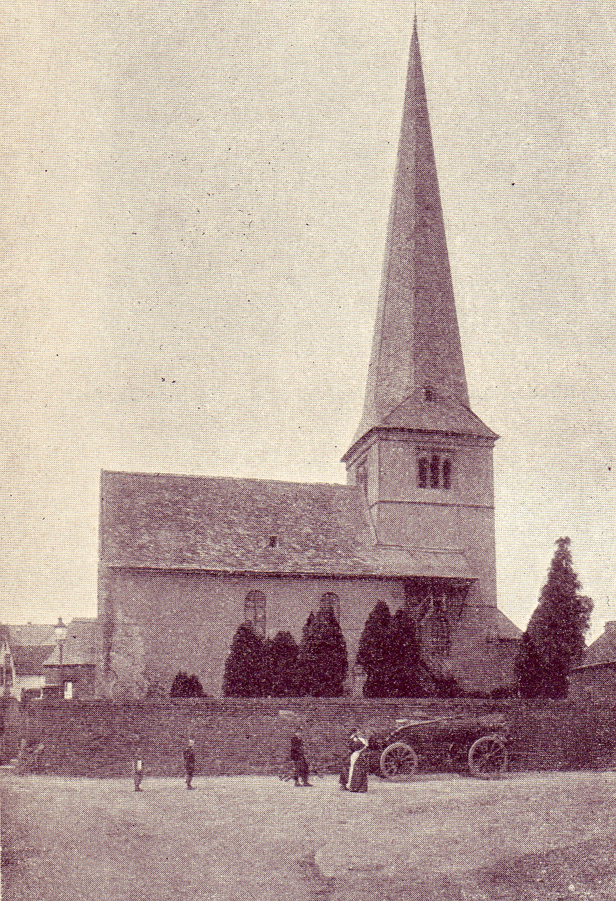 St. Andreas (Bonn)vor 1902